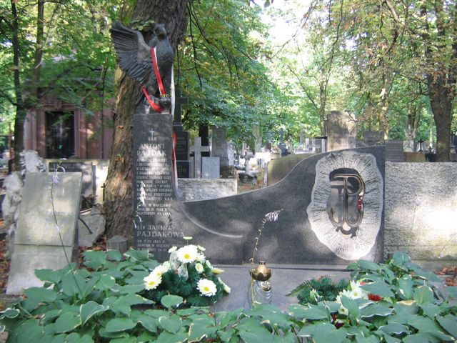 Antoni Pajdak's monument (Powązki Cemetery)